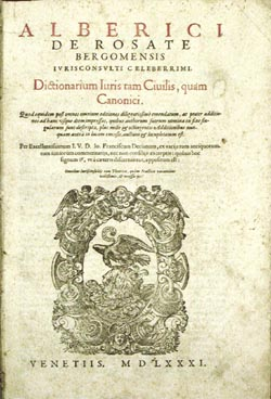 Dictionarium iuris tam civilis quam canonici, Alberici de Rosate (1290-1354)